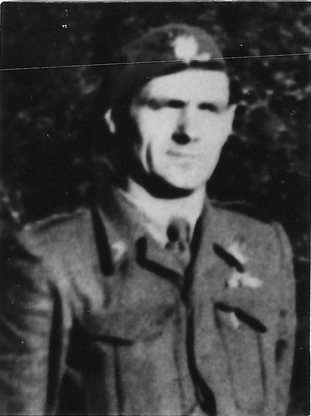 Żołnierz Odcinka V Wachlarza